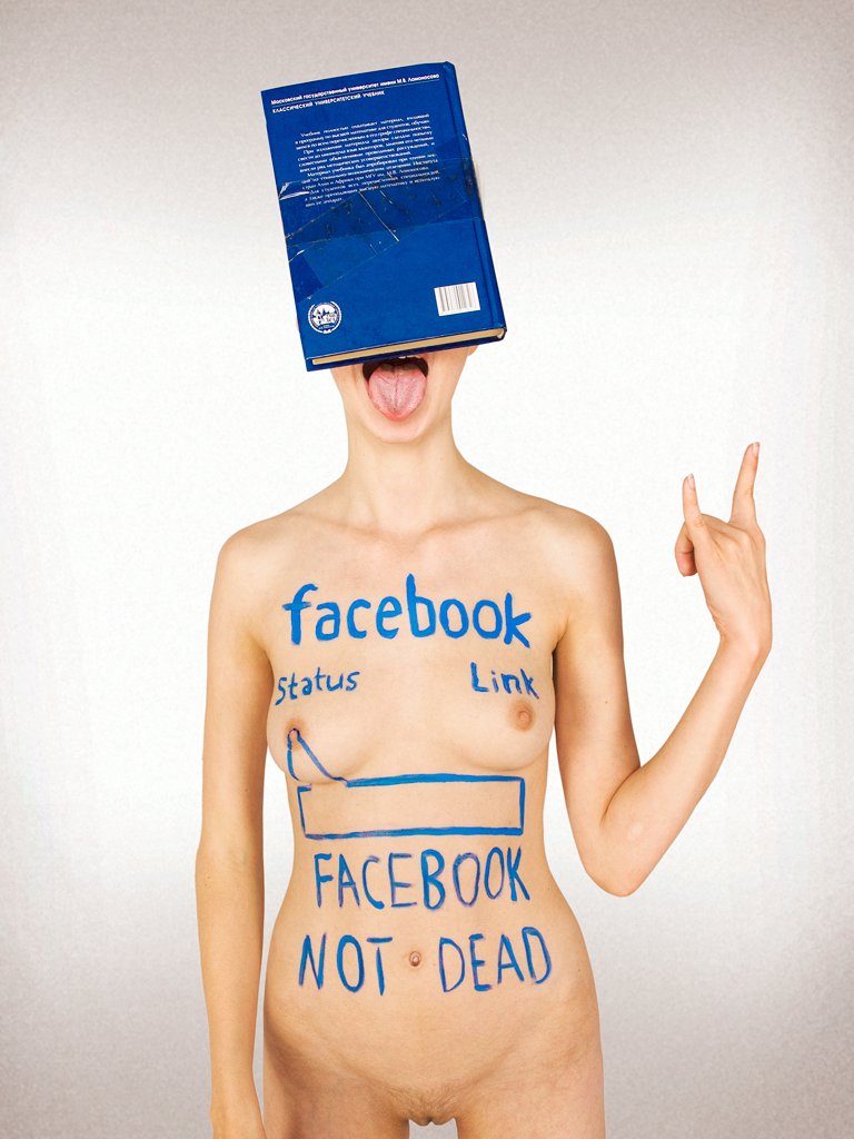 Model - charming Svetlana Novikova